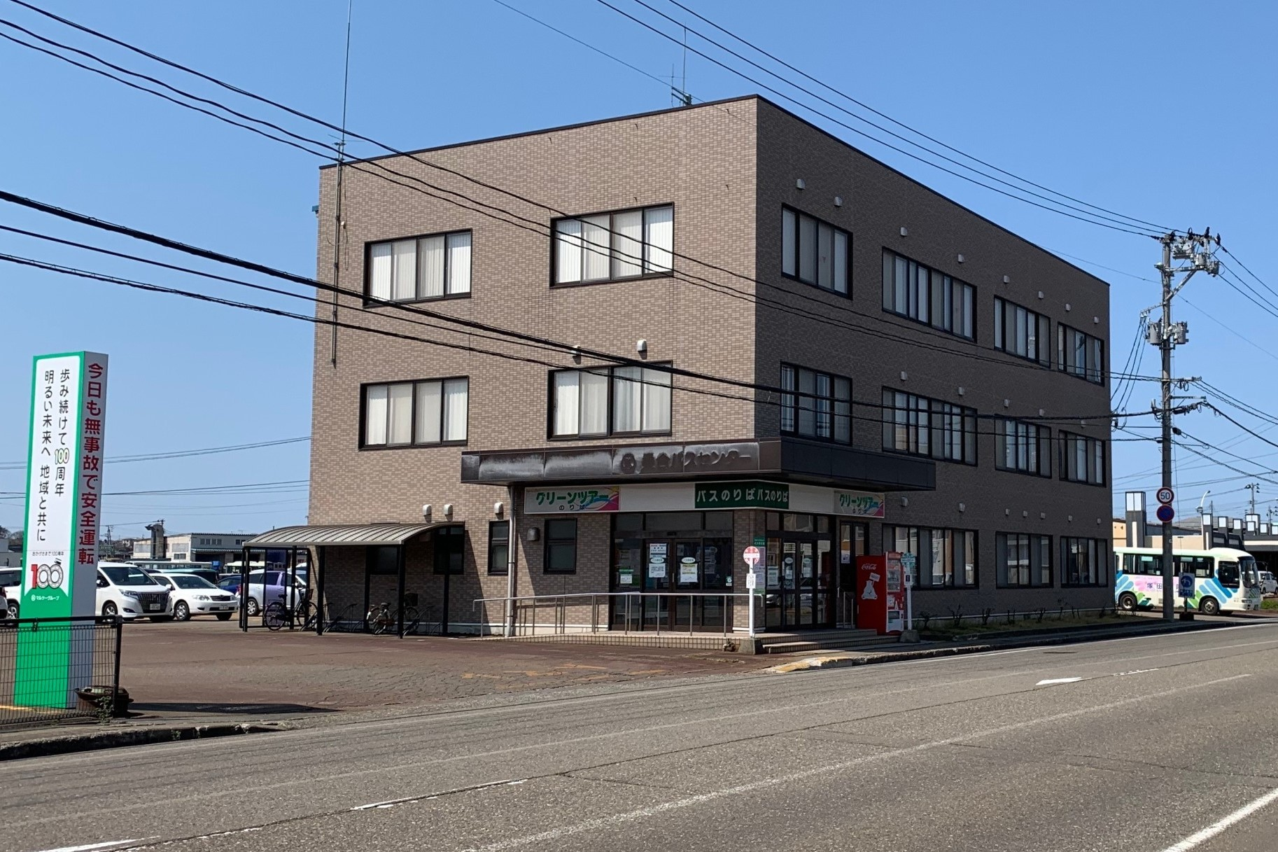 頸城自動車 マルケーバスセンター（2020年4月）